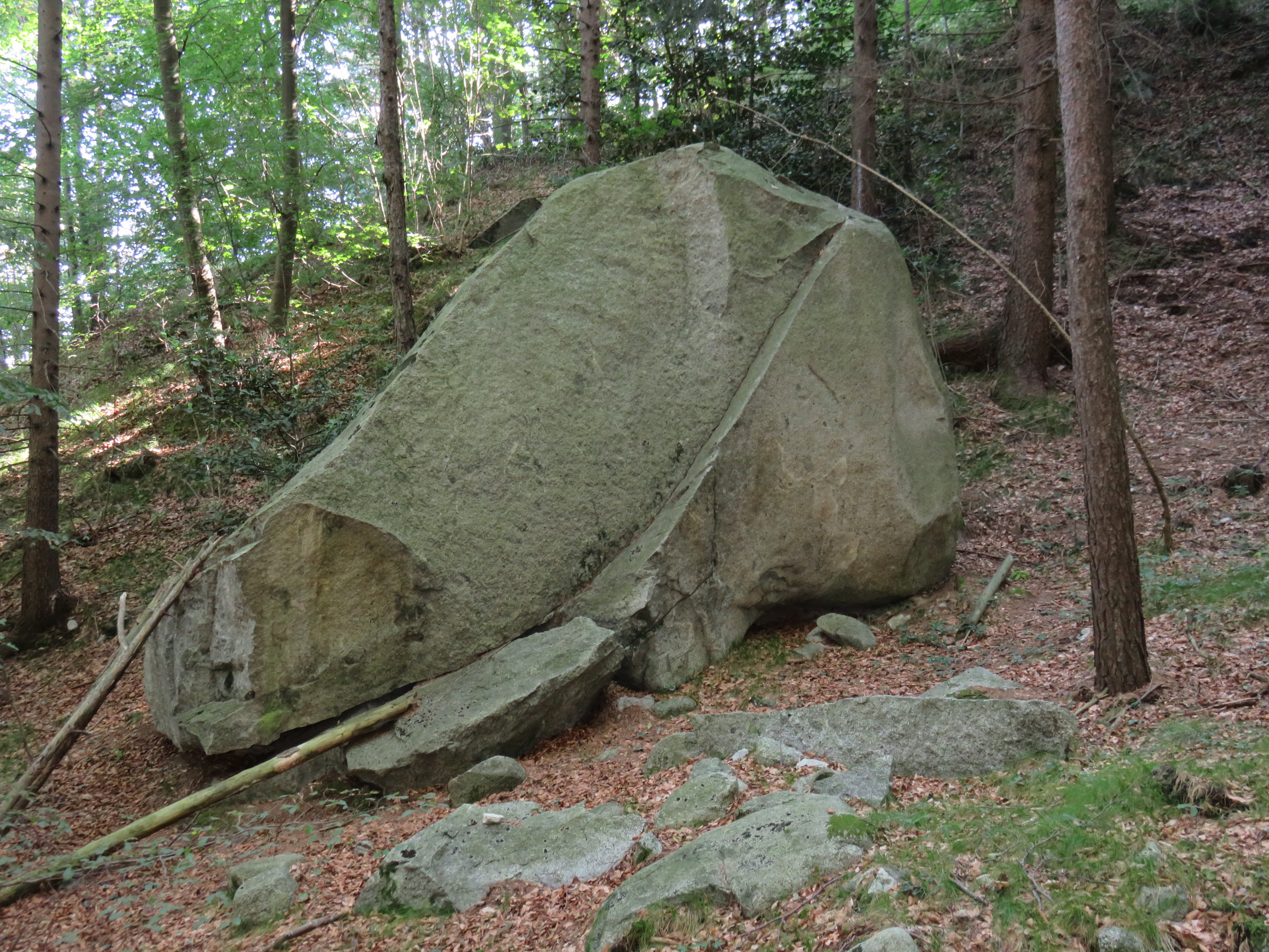 Granitblock nahe Pregasina, Trentino, Italien